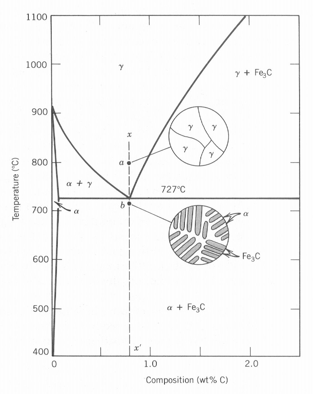 diagrama de fases ferro carbono